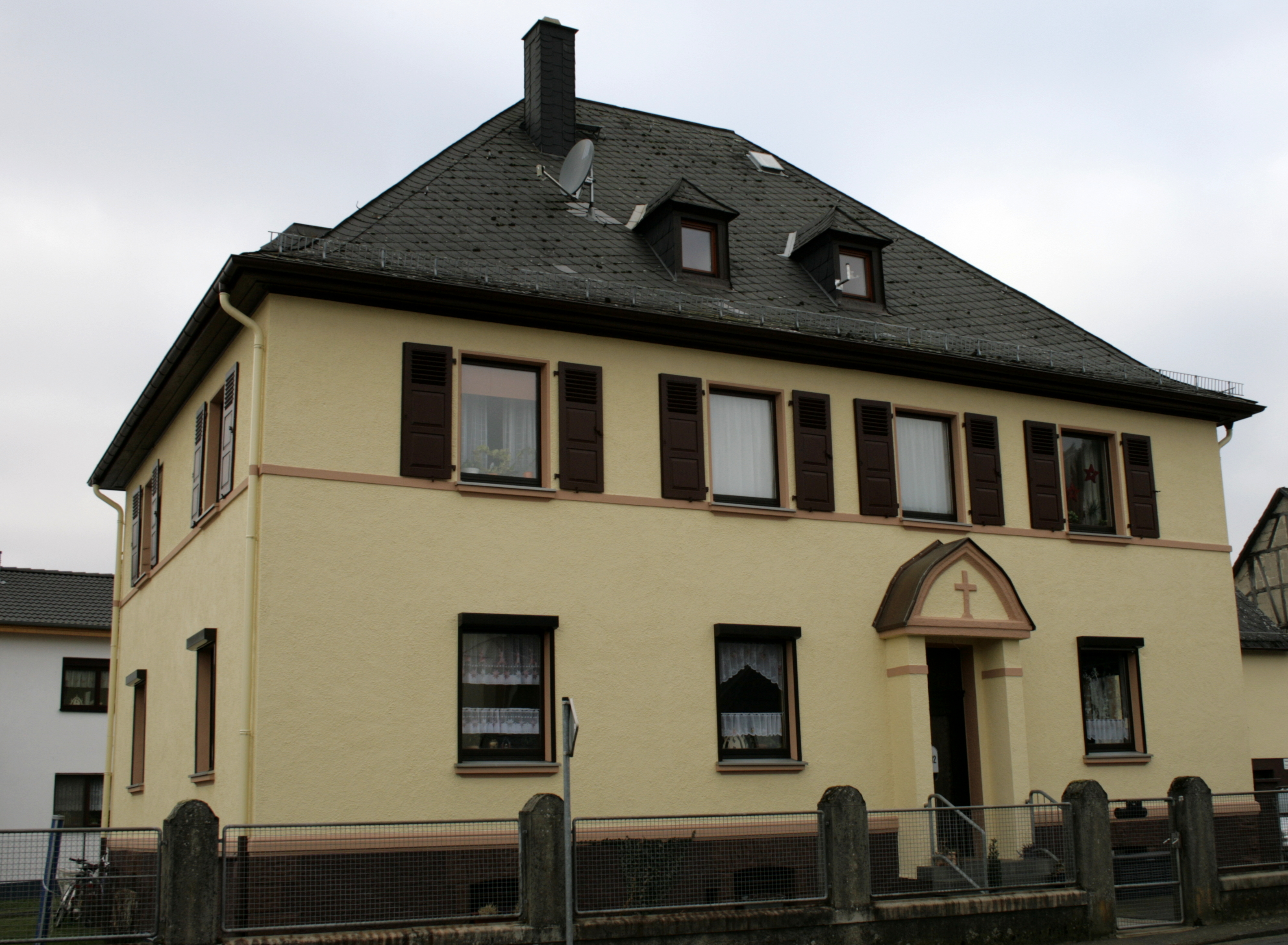 ehem. Kindergarten "Marienstift" in Hadamar-Oberweyer, Deutschland